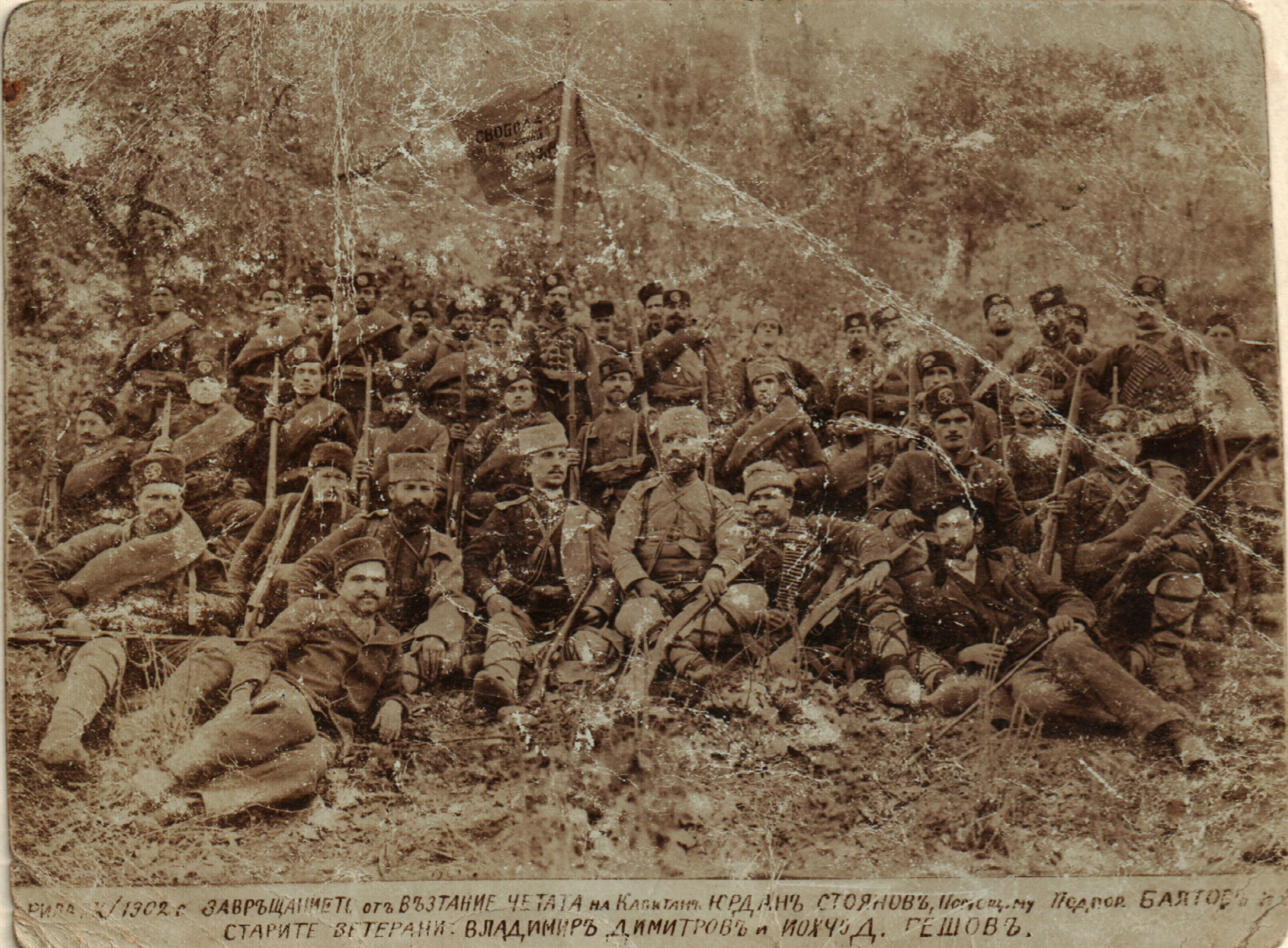 Четата на капитан Юрдан Стоянов и помощника му подпоручик Илия Балтов в Рила след Горноджумайското въстание, 1902 г.